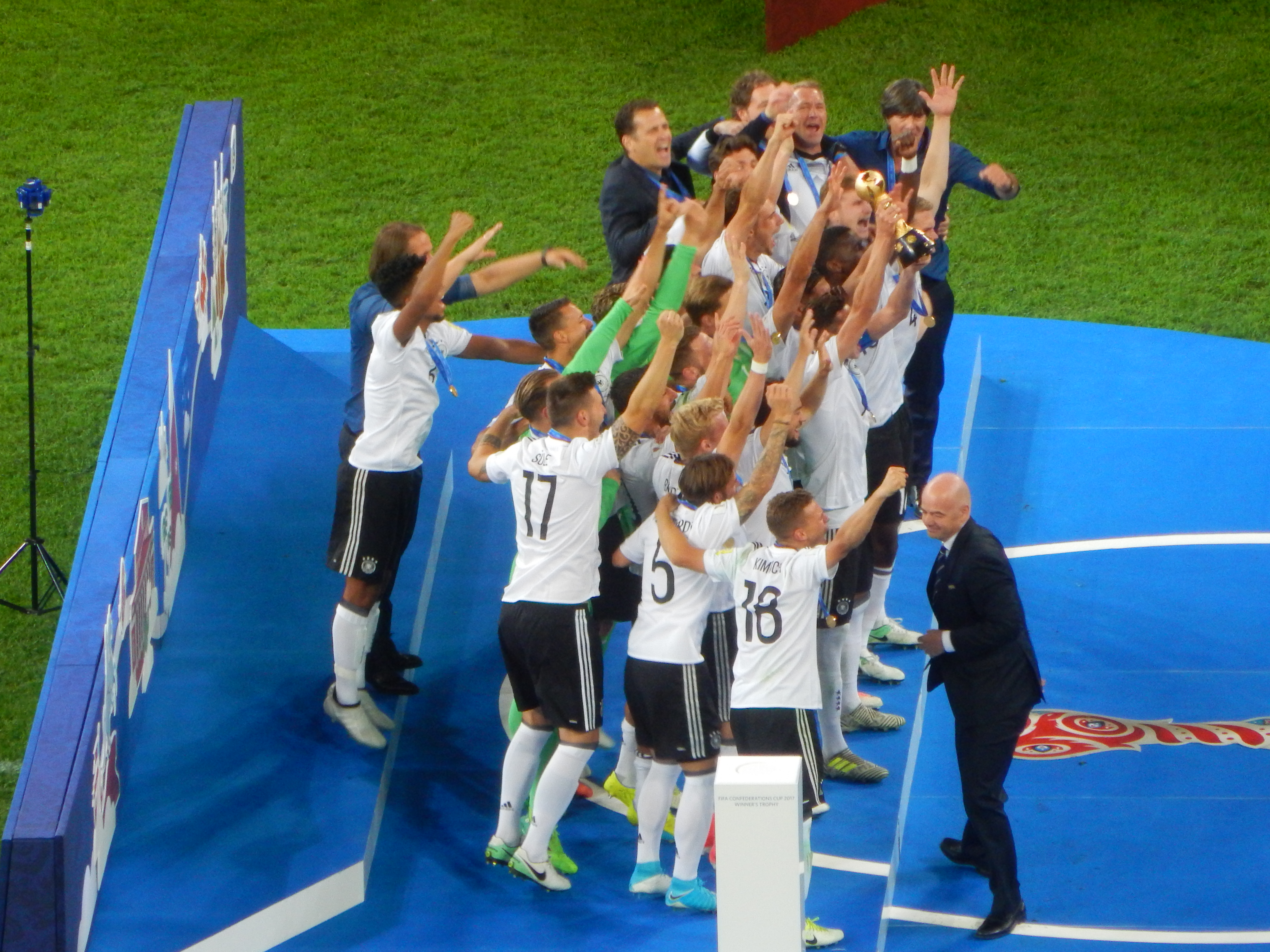 Финал Кубка конфедераций 2017